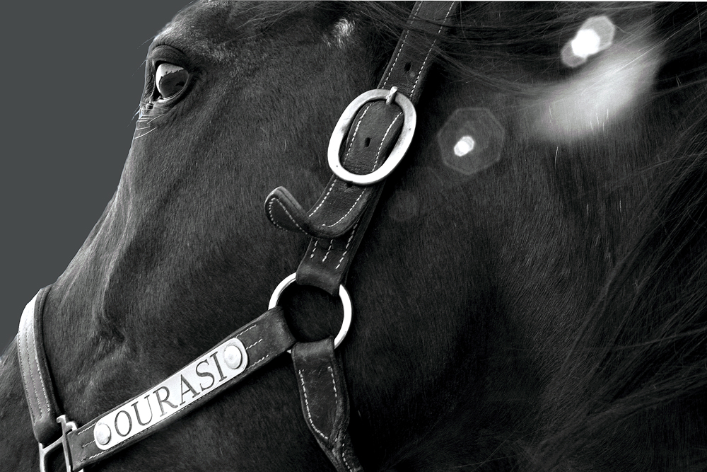 Photographie Noir et Blanc de la tête d'Ourasi (profil gauche) avec le licol marqué à son nom.